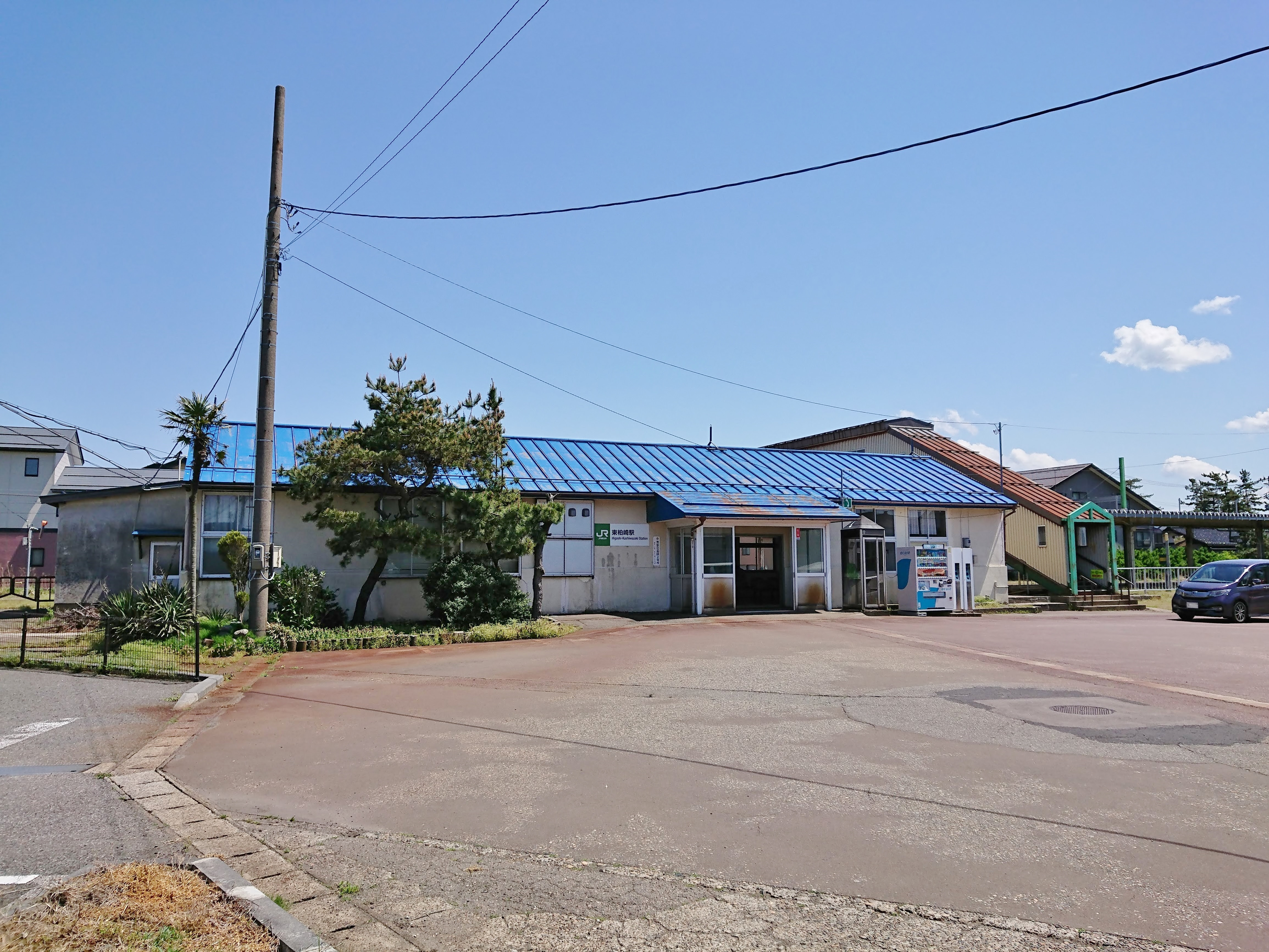 東柏崎駅の外観